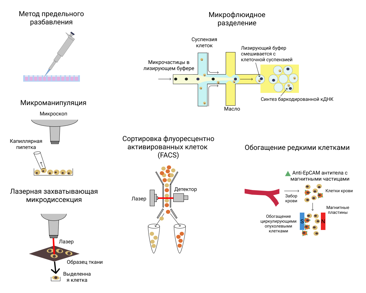 Методы выделения единичных клеток эукариот, например, для проведения секвенирования РНК.